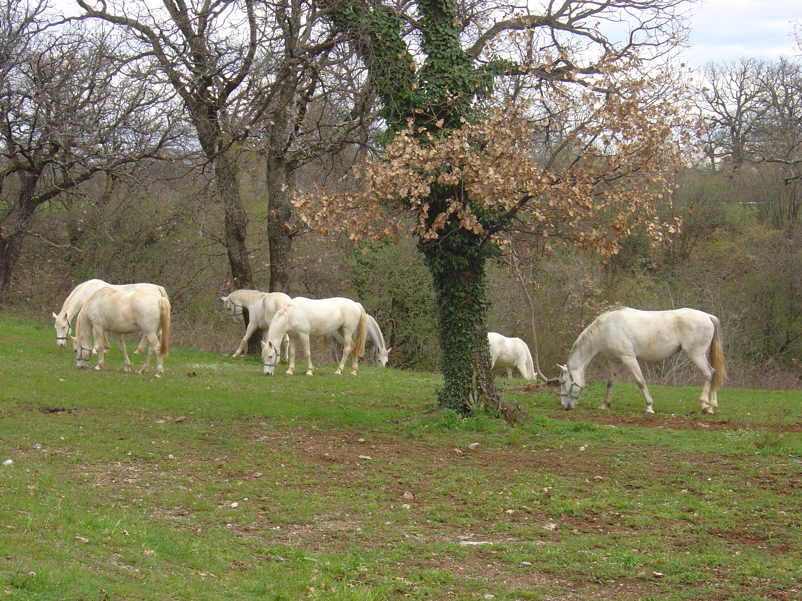 Lipica, Sežana, Slovenia